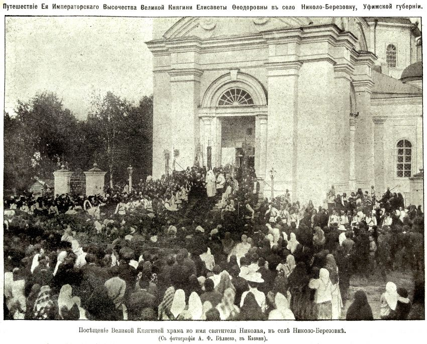 Башкортостан. Николо-Березовка. Церковь Николая Чудотворца.